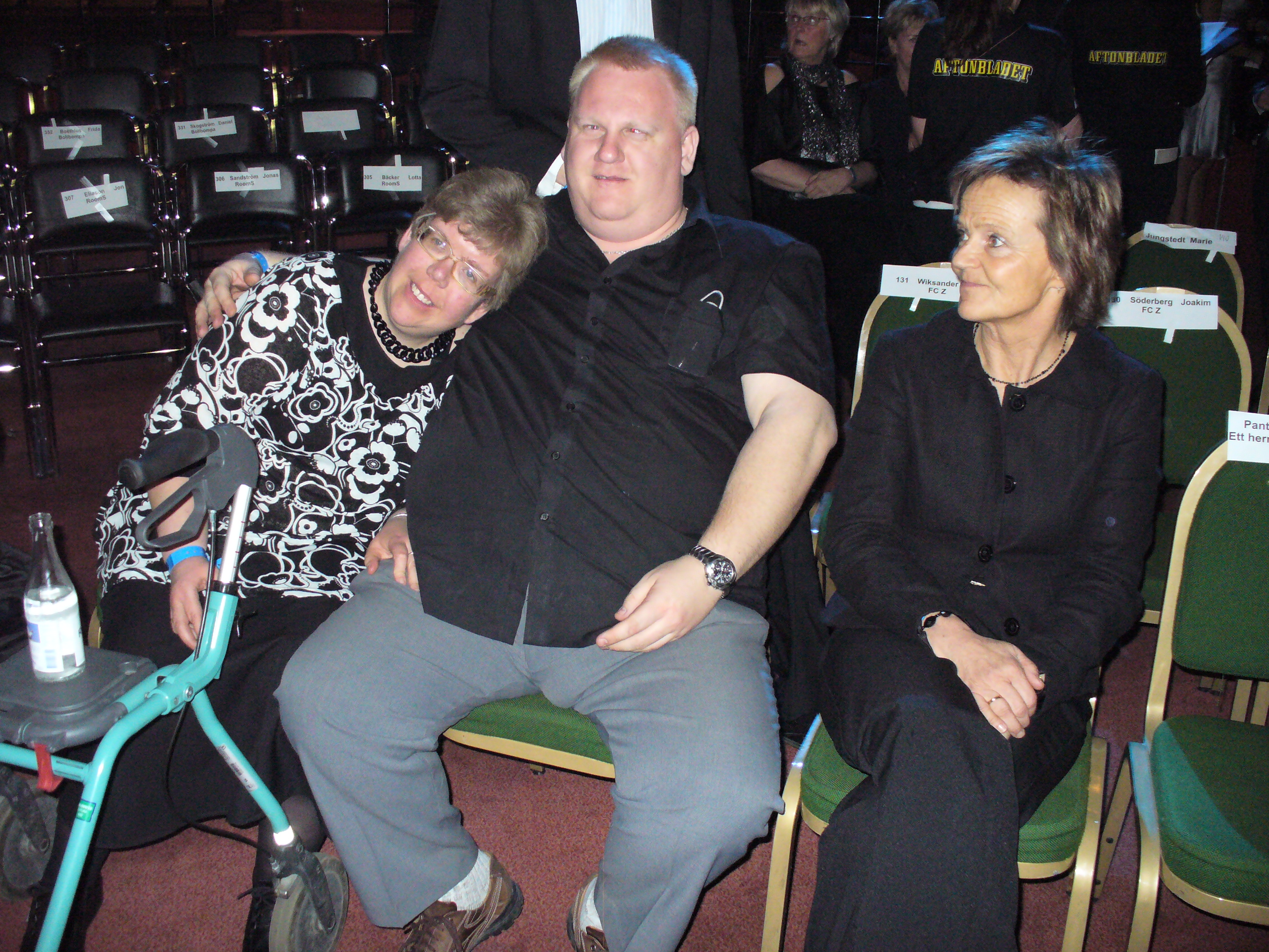 Linda Hammar and her boyfriend Mats at Aftonbladet TV Awards.